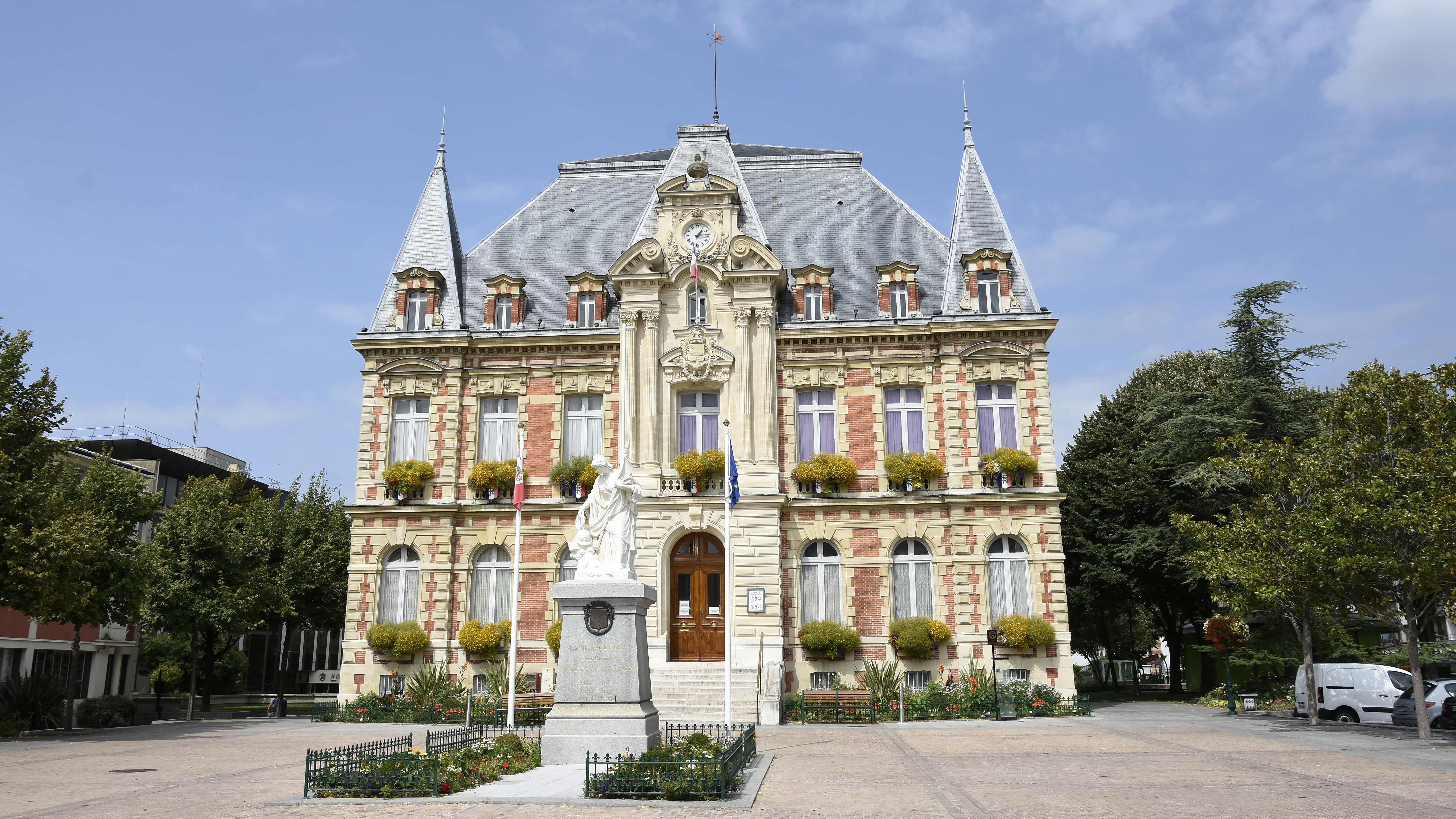 Stadhuis van Rueil-Malmaison, Frankrijk